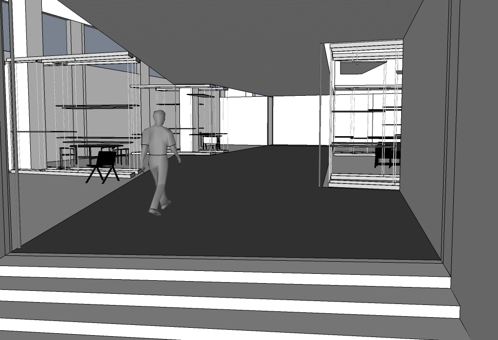 Template:ScreenshotCopyrighted